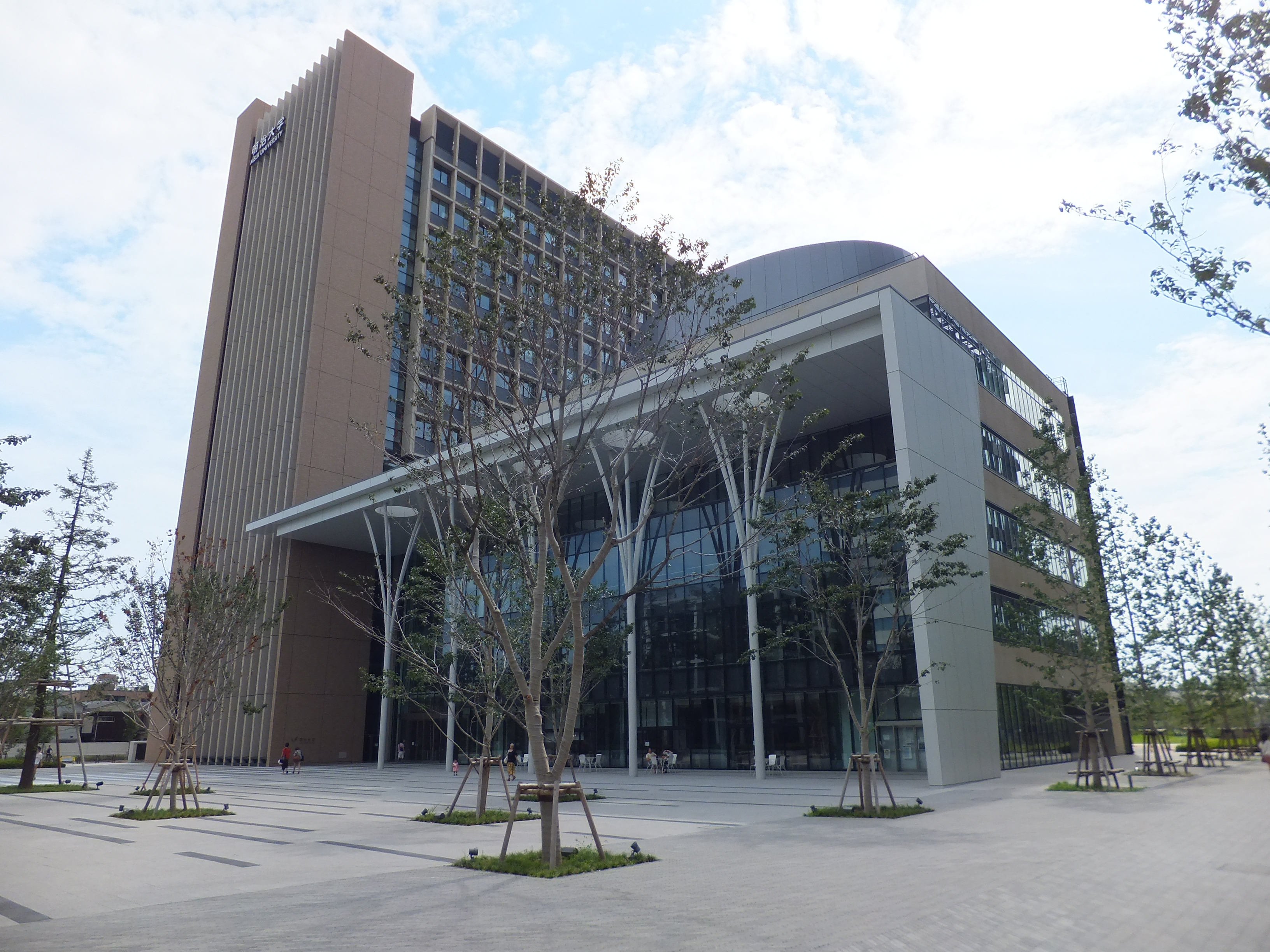 明治大学中野キャンパス